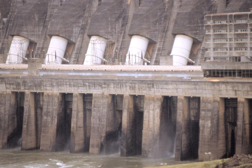 Itaipu, Detail der Staumauer